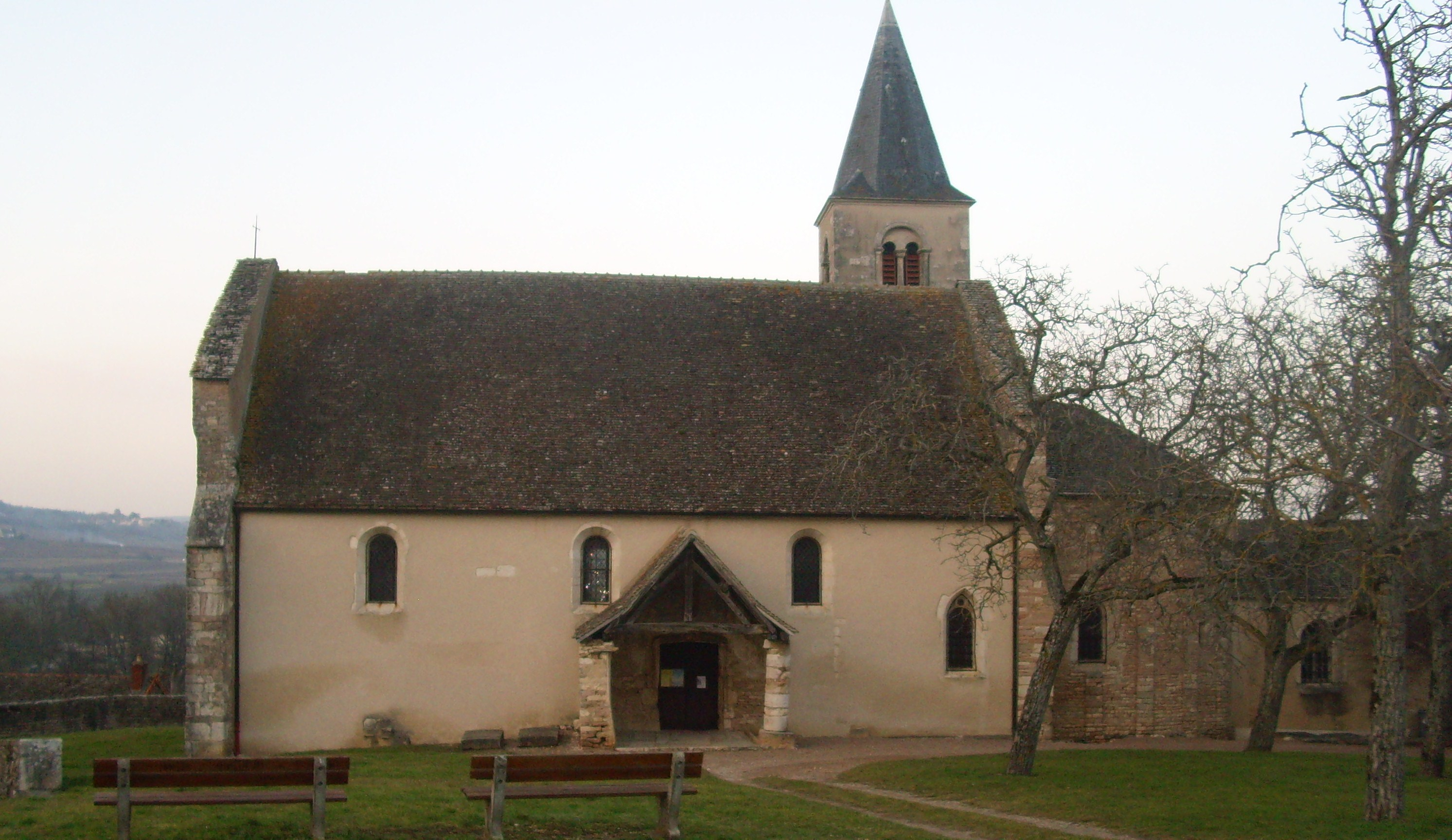 Eglise de Mellecey